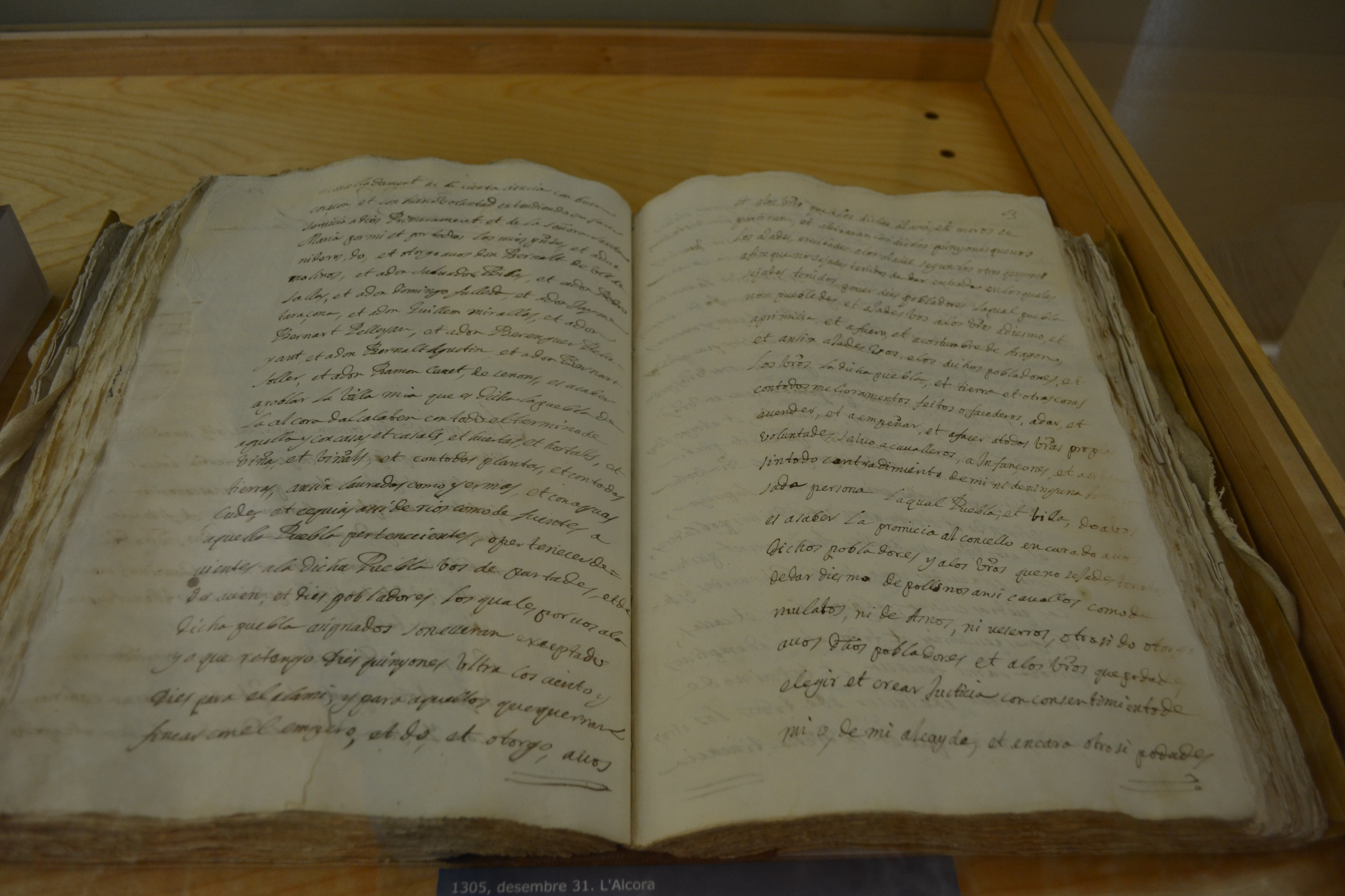 En Joan Eximén d'Urrea, senyor de Monteagudo i d'Alcalatén, atorga carta pobla a la vila d'Alcora per a 110 cristians, a fur d'Aragó. ARV: Manamments i empars, 1664, llibre2, mà 18, fol. 12 (còpia de 8 de juliol de 1664). Arxiu del Regne de València .